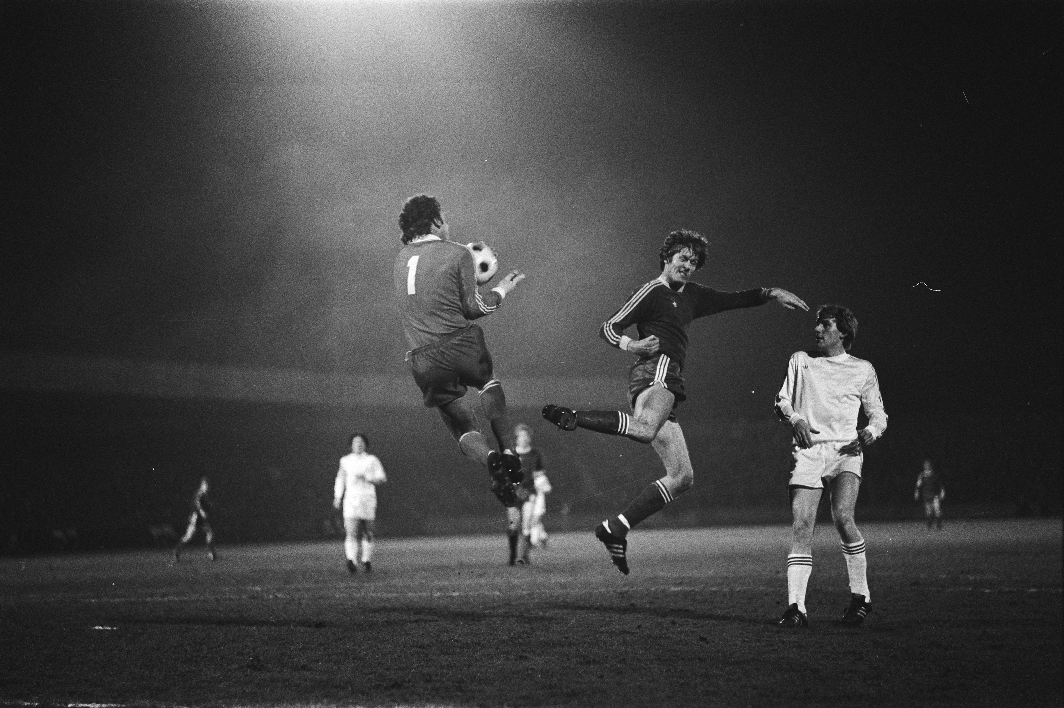 Halve finale Europacup II, Twente tegen FC Anderlecht , Hallvar Thoresen (midden) met doelman De Bree die bal pakt